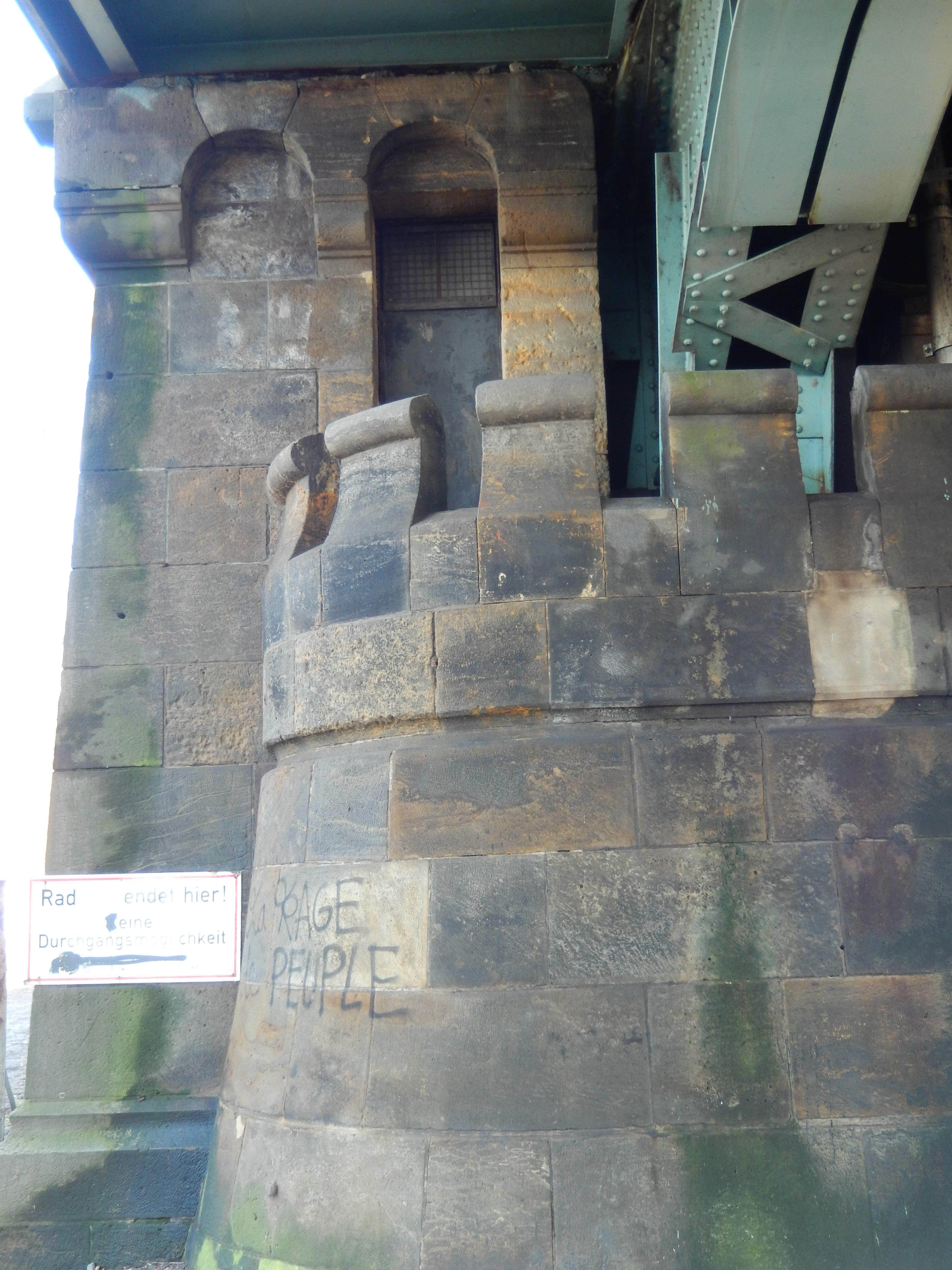 Dresden: Zugang zu den Wartungsräumen und Brückenwiderlager bzw.Ankerkammer unter der Brücke Blaues Wunder, Neustädter Seite. Konnten auch als Sprengkammer im Kalten Krieg genutzt werden.